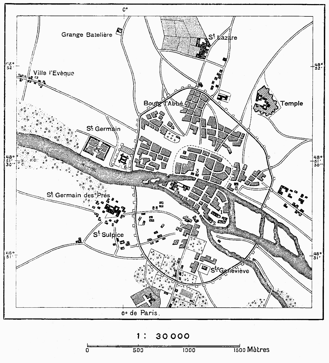 N° 337. Paris sous Philippe-Auguste.